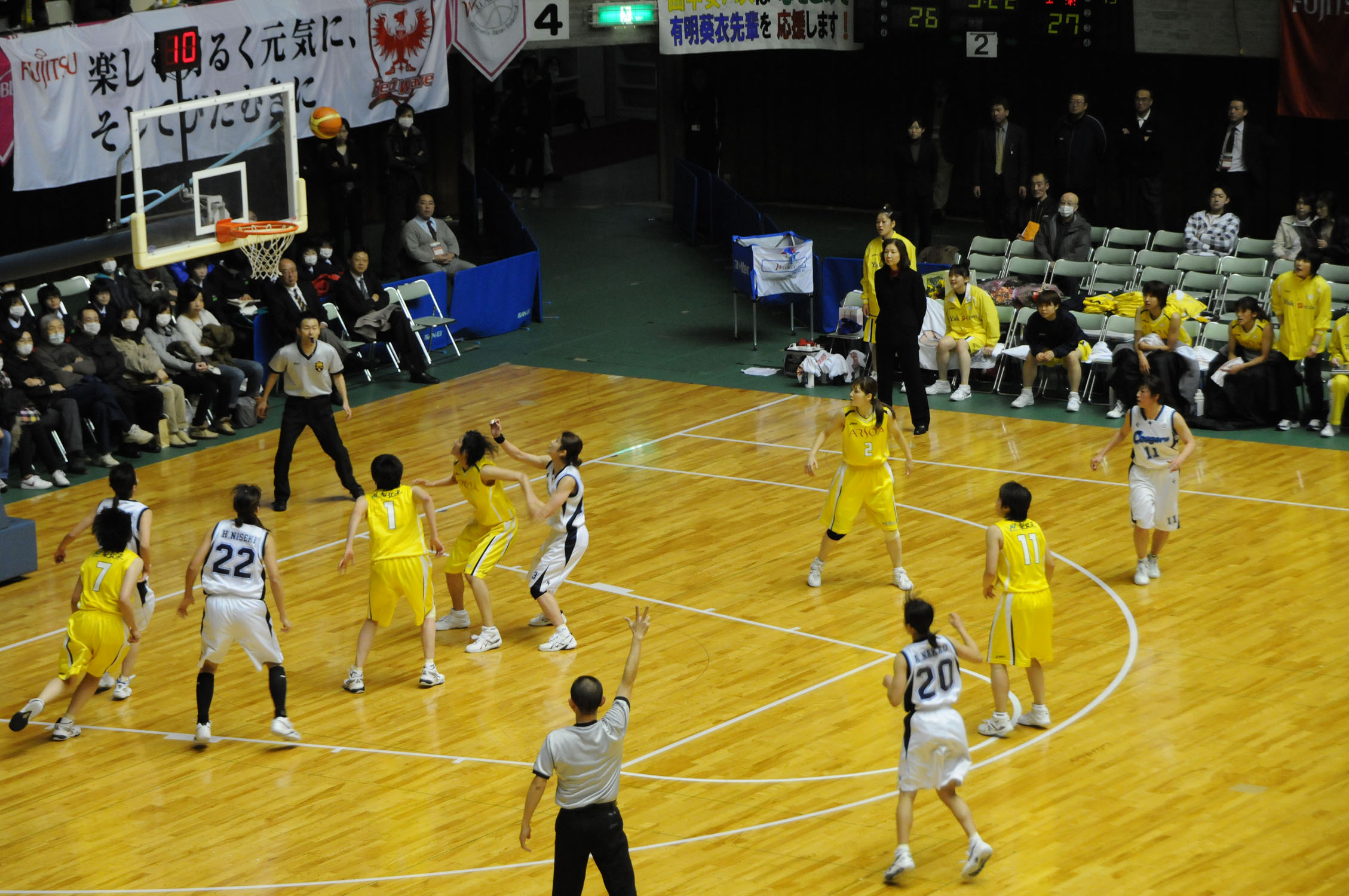 WJBL 09-10レギュラーリーグ WI、日立ハイテク対山梨。秋田県立体育館で。